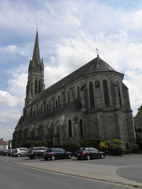 Chevet et vue latérale de l'église Saint-Aubin de Saint-Aubin-d'Aubigné (35).